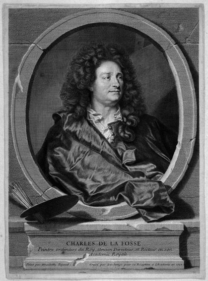 Charles de La Fosse